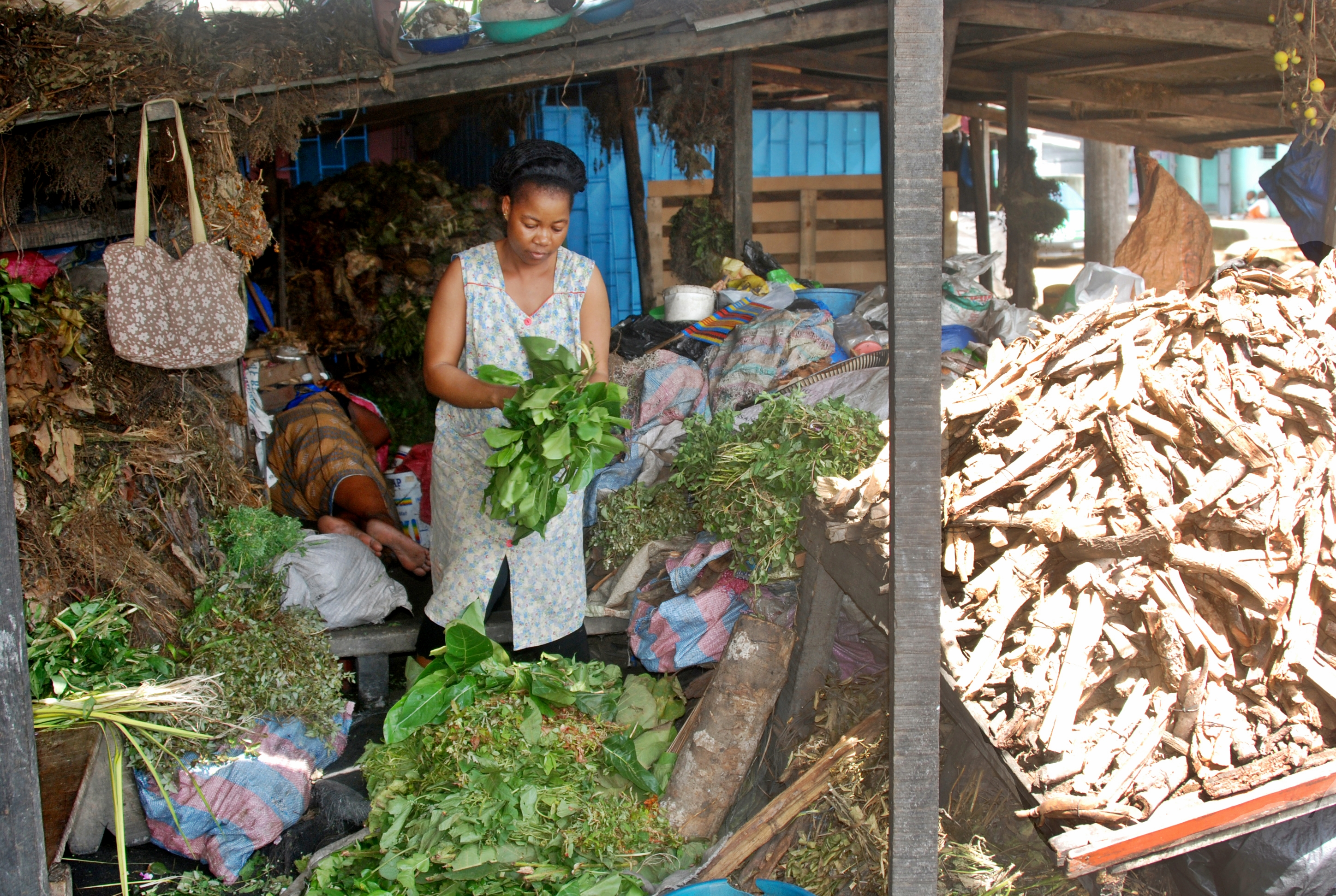 une vendeuse de plantes médicinales dans la ville d'Abidjan This is an image of "African people at work" from Ivory Coast